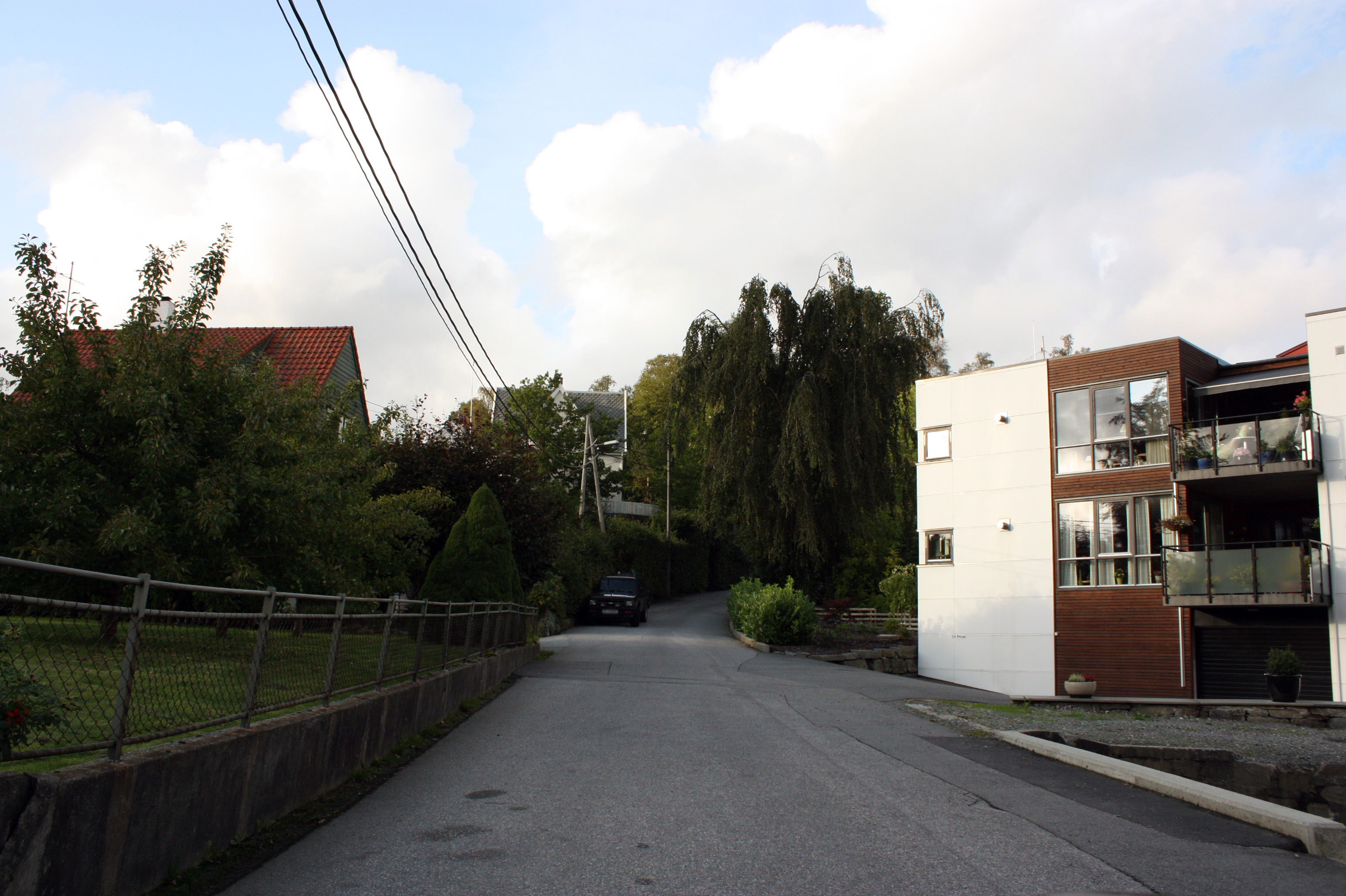 Nesttunhalsen, Fana, Bergen.